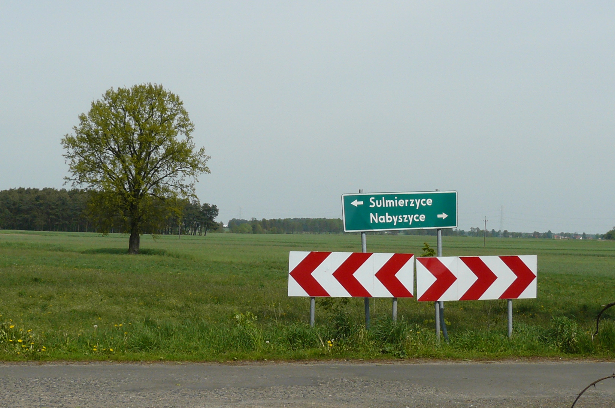 Wieś Gliśnica.